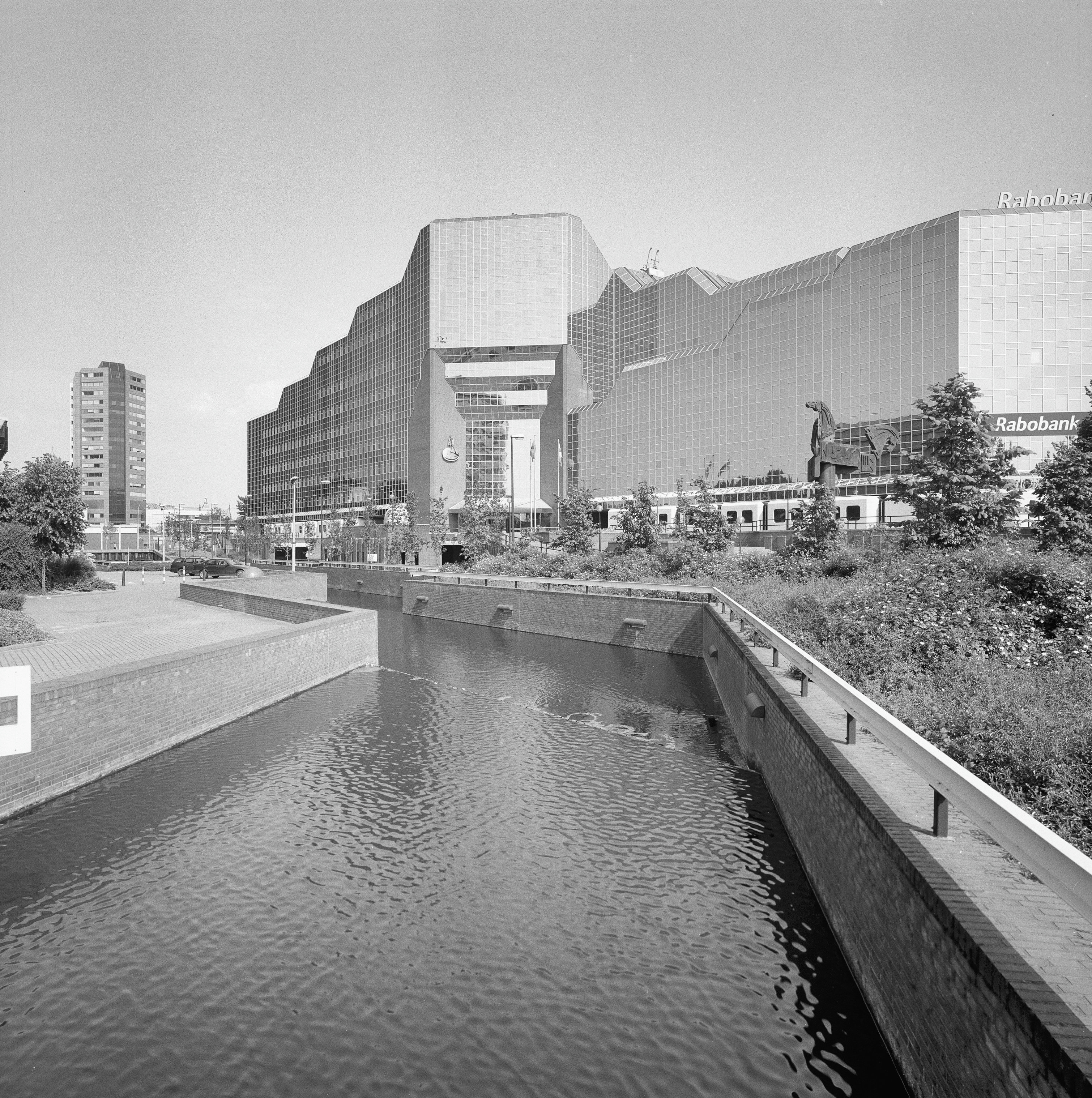 Hoofdkantoor Rabo-Bank: Exterieur OVERZICHT VOORGEVEL (opmerking: Monumenten In Nederland UTRECHT, BLADZIJDE 277)